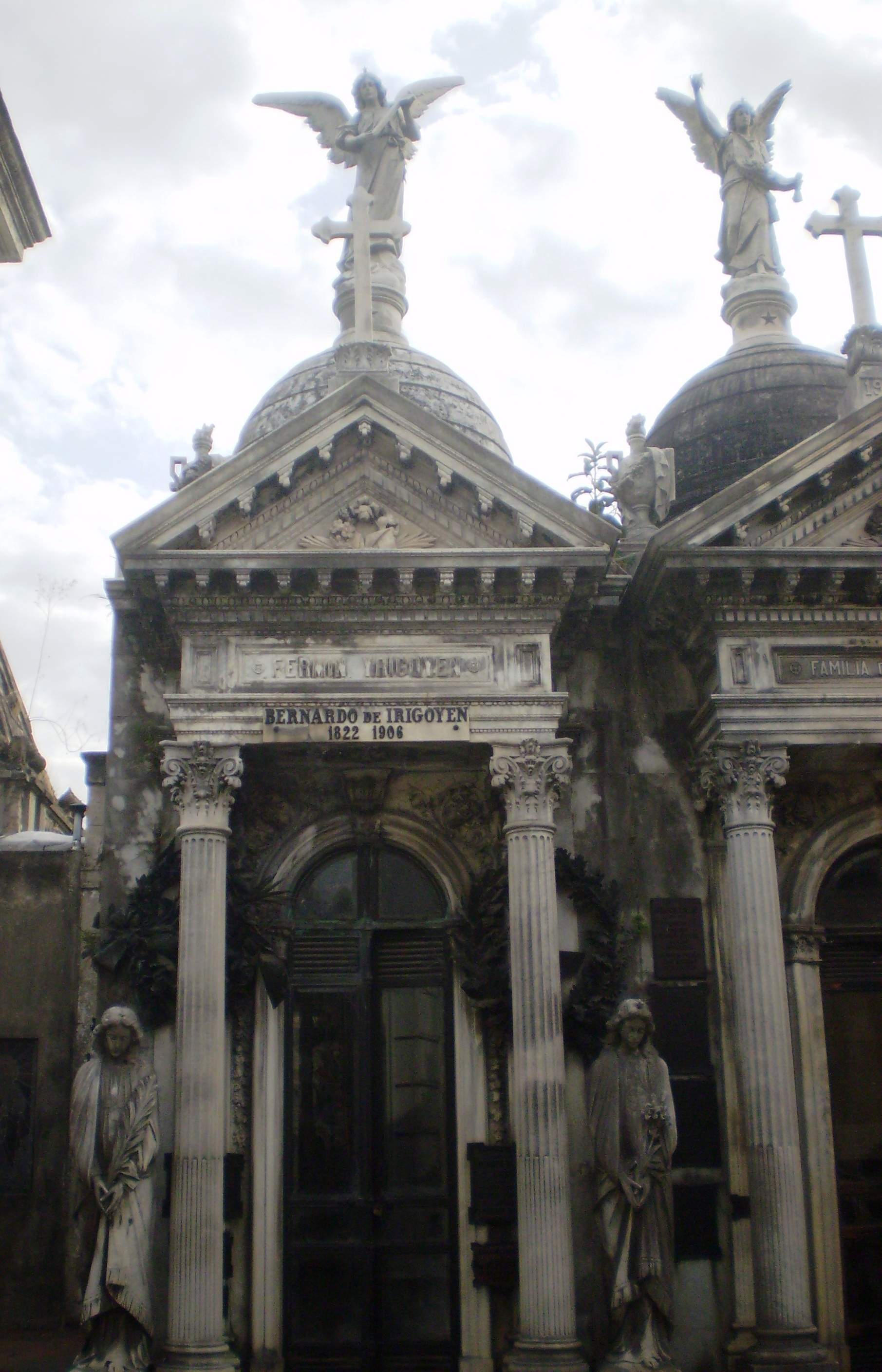 Bóveda de Bernardo de Irigoyen, Cementerio de la Recoleta, Buenos Aires (Argentina).